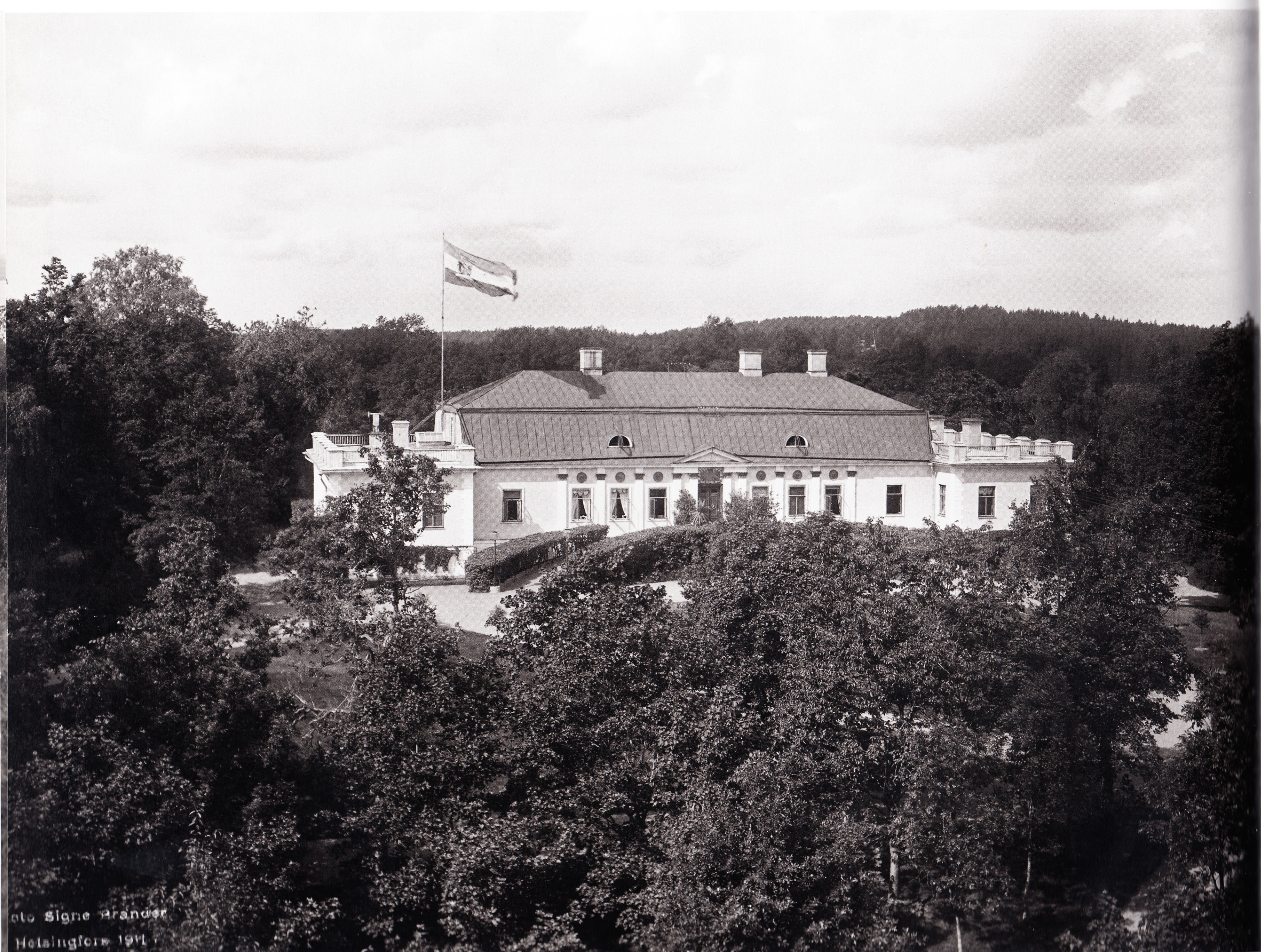 Joensuun kartano Halikossa